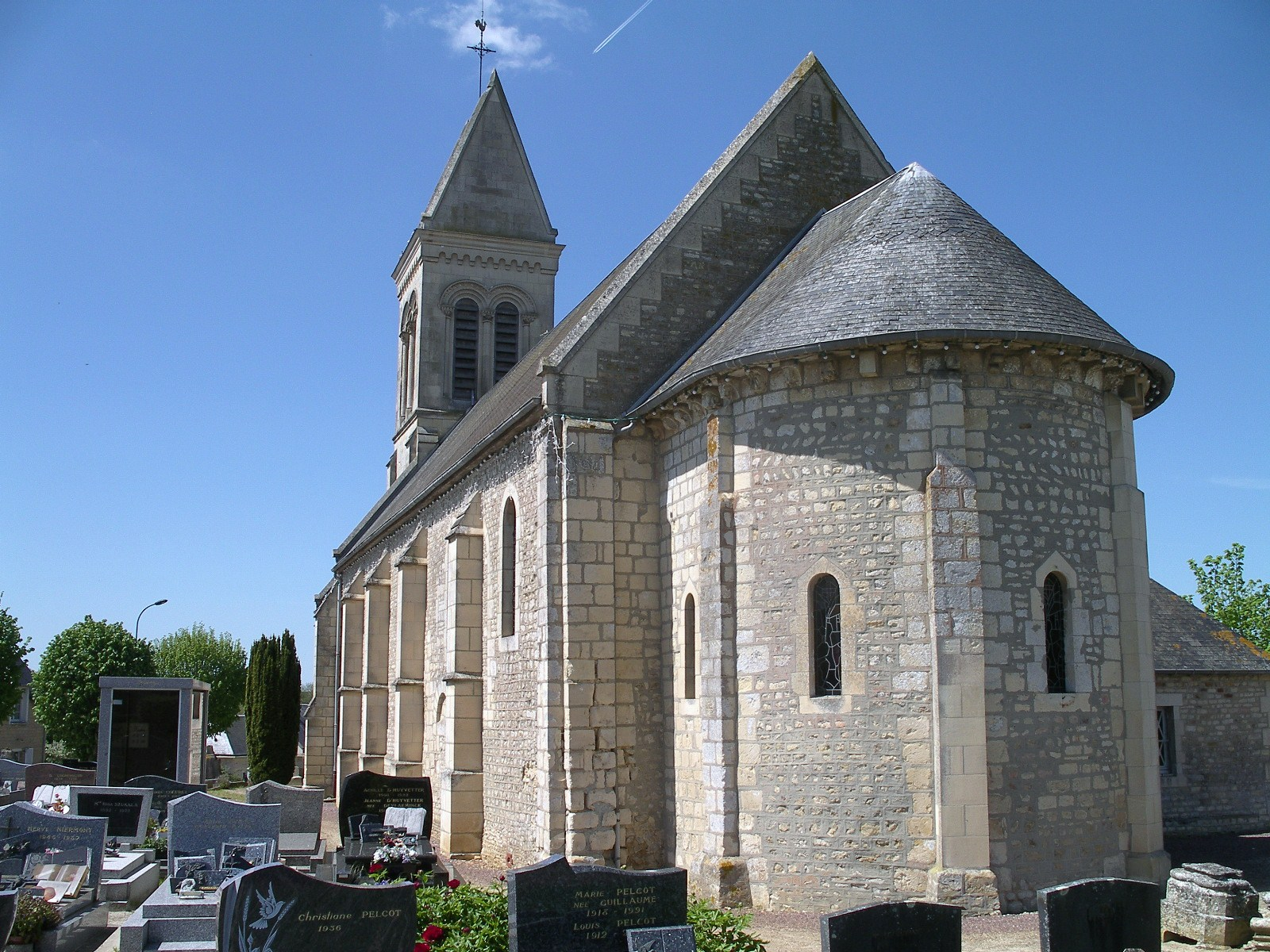 Eglise d'Esquay-Notre-Dame (Calvados) classée MH